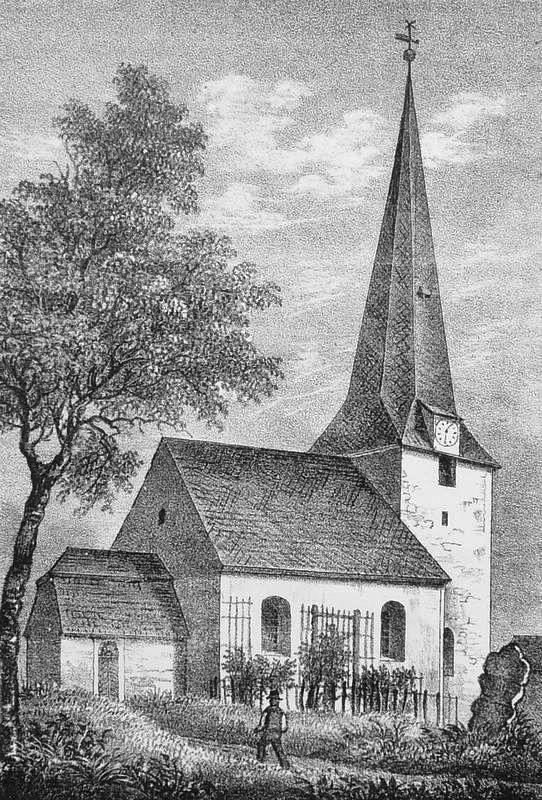 Die Kirche in Göbschelwitz bei Leipzig um 1840